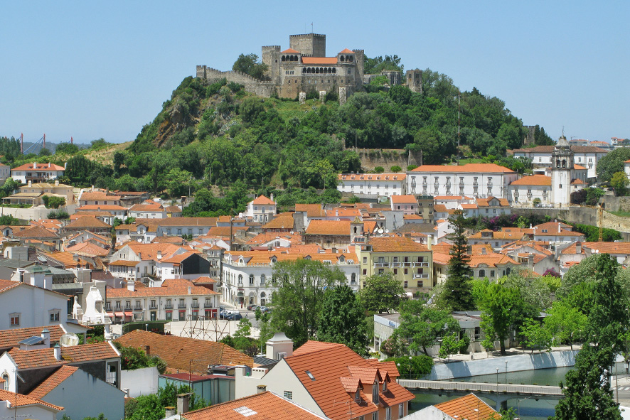 Leiria e Castelo